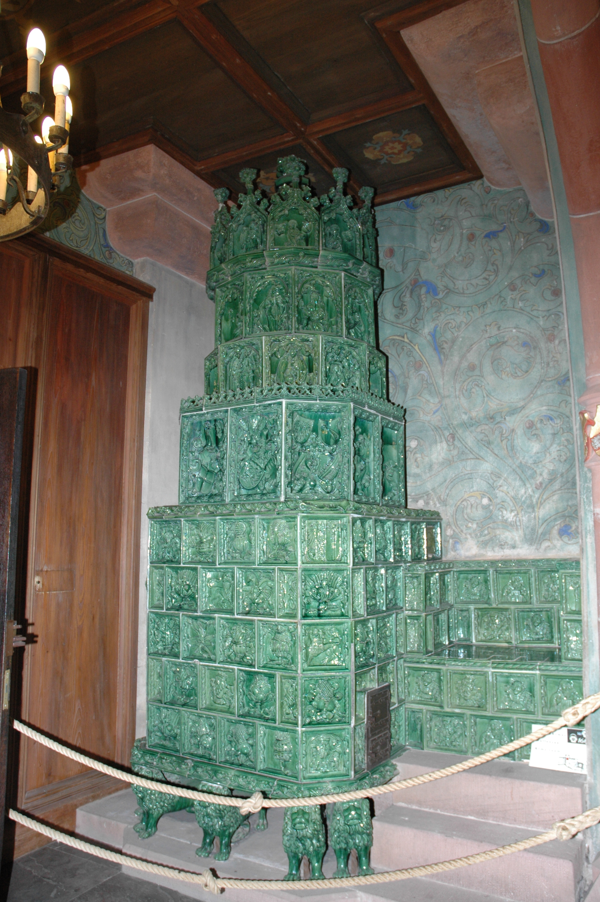 A 369